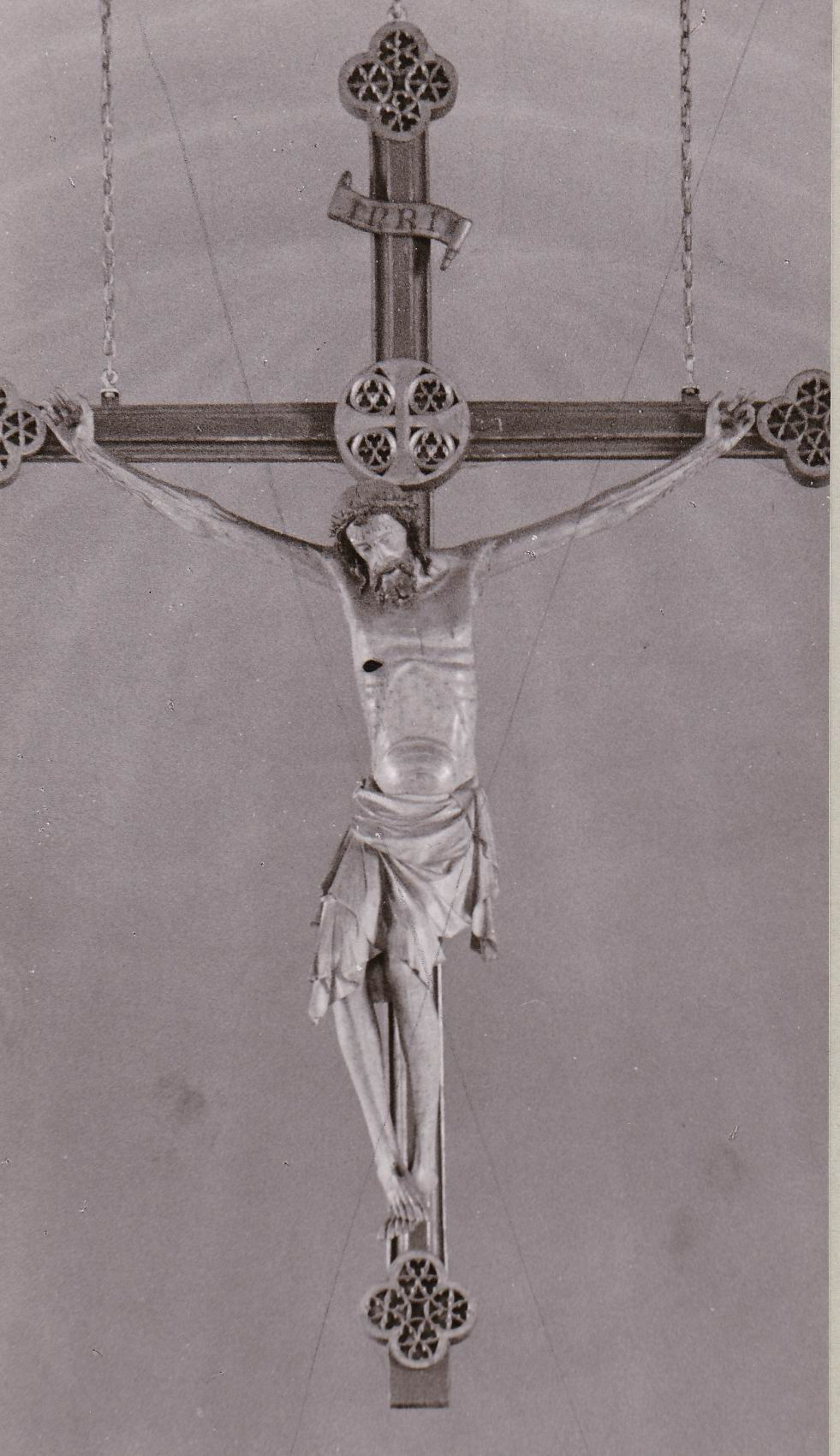 Triumphkreuz in St. Vincentius,Dinslaken. Holz, farbig gefasst, Rheinland oder Maasgebiet, um 1310.